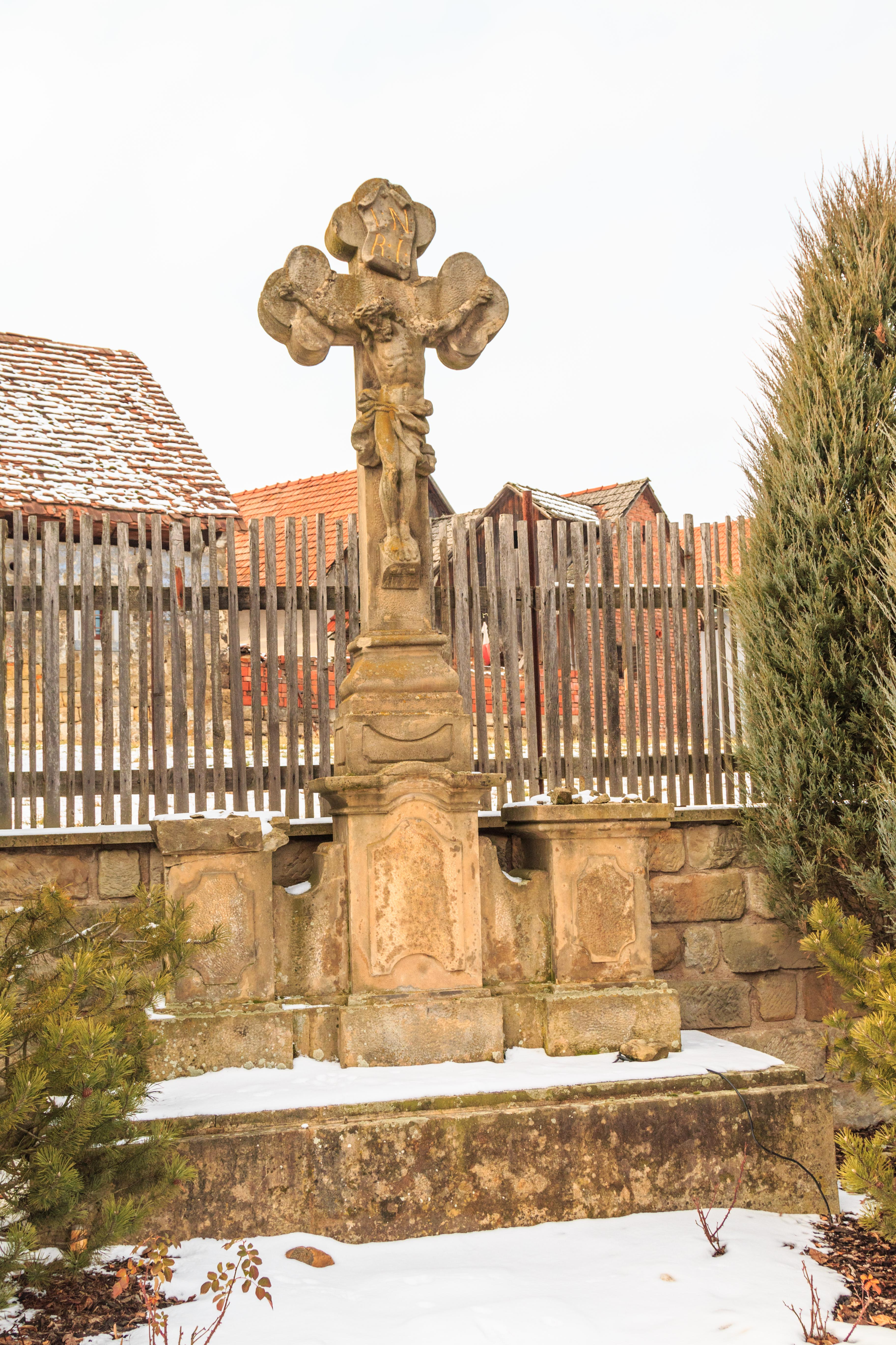 Sousoší Kalvárie, náves, Střevač.